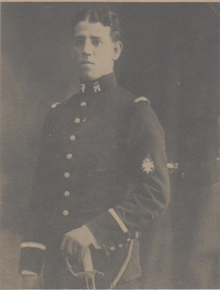 Mayor Gustavo Arévalo Vera